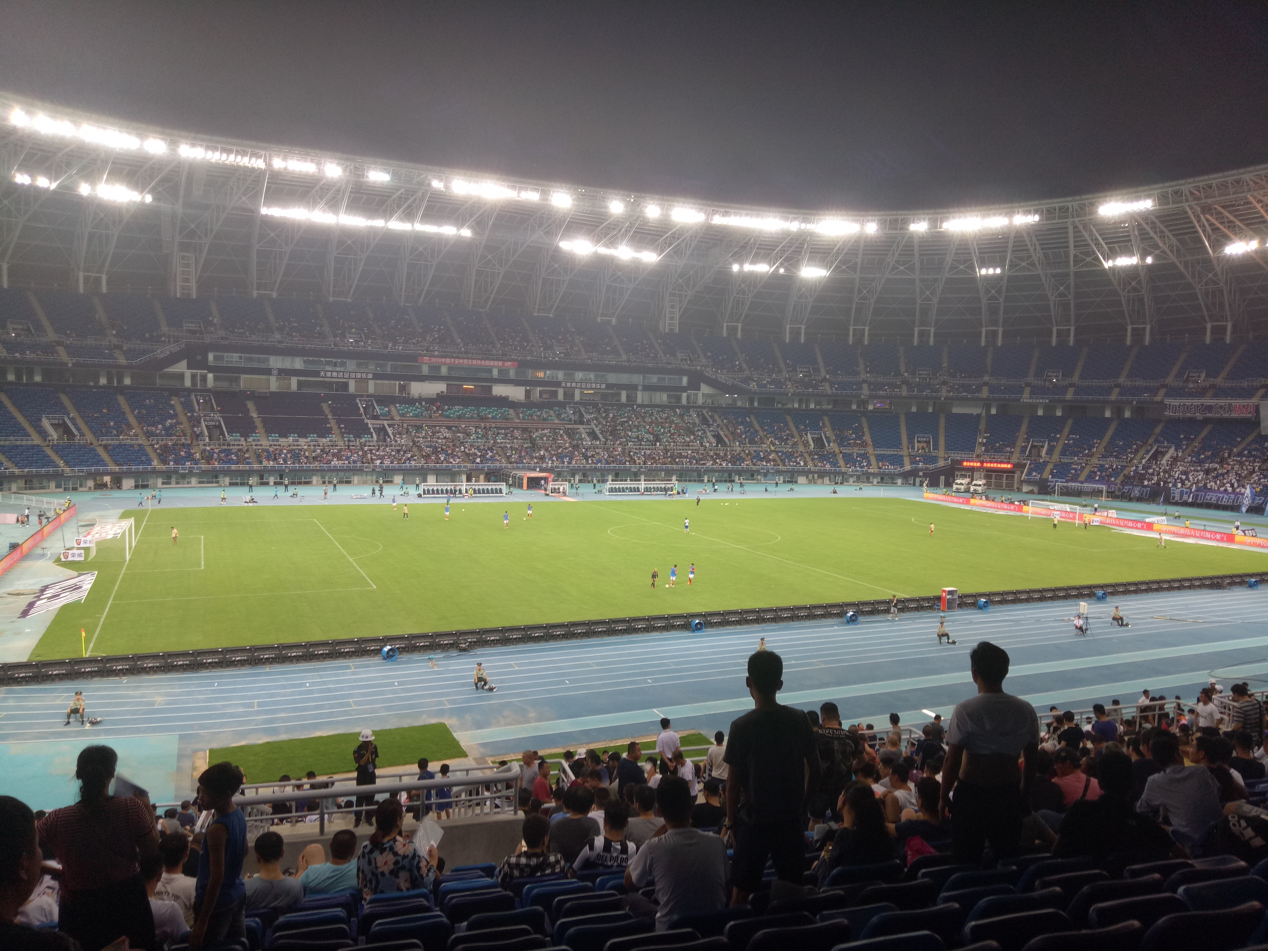 2018年8月2日，中国天津奥体中心，2018年中国足球协会超级联赛，天津泰达0－3广州恒大淘宝